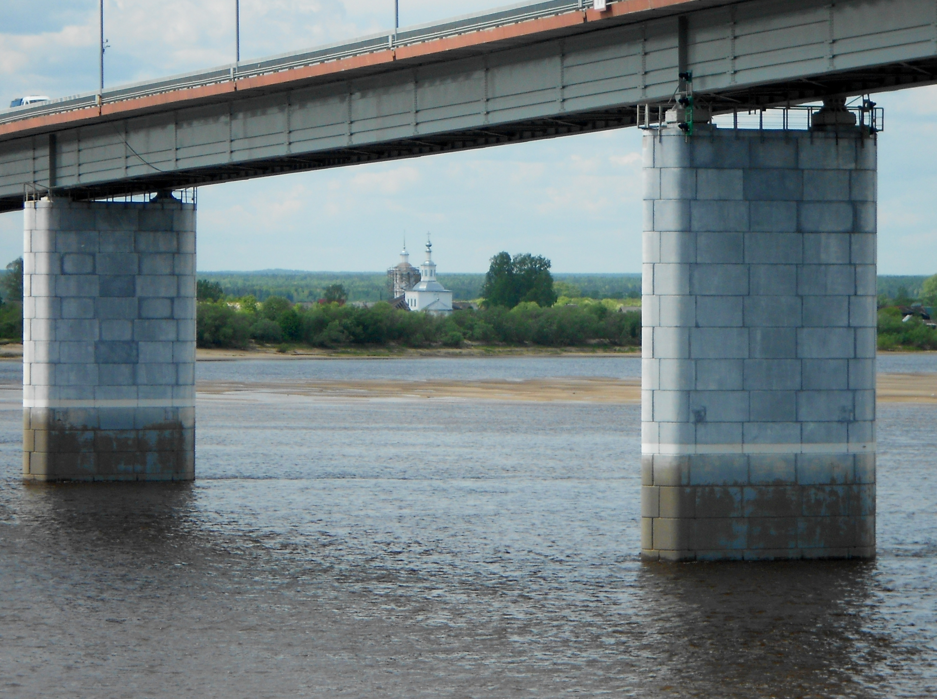 Архангельская область, Котлас